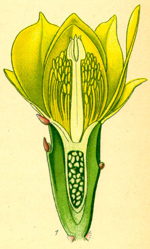 Blütenschnitt von Opuntia vulgaris